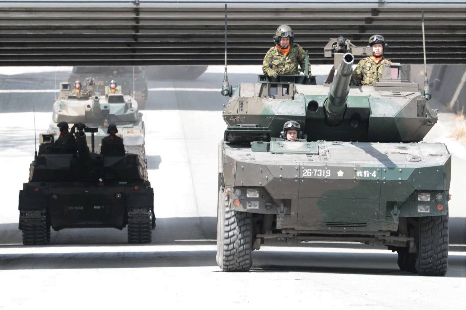 陸自機甲教導連隊移駐に伴う画像